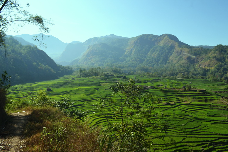 Hamparan Sawah Penerima Dampak Longsonran Bawakaraeng 2014 dekat Manimbahoi di Kec. Parigi, Gowa. (Foto: Darmawan Denassa).